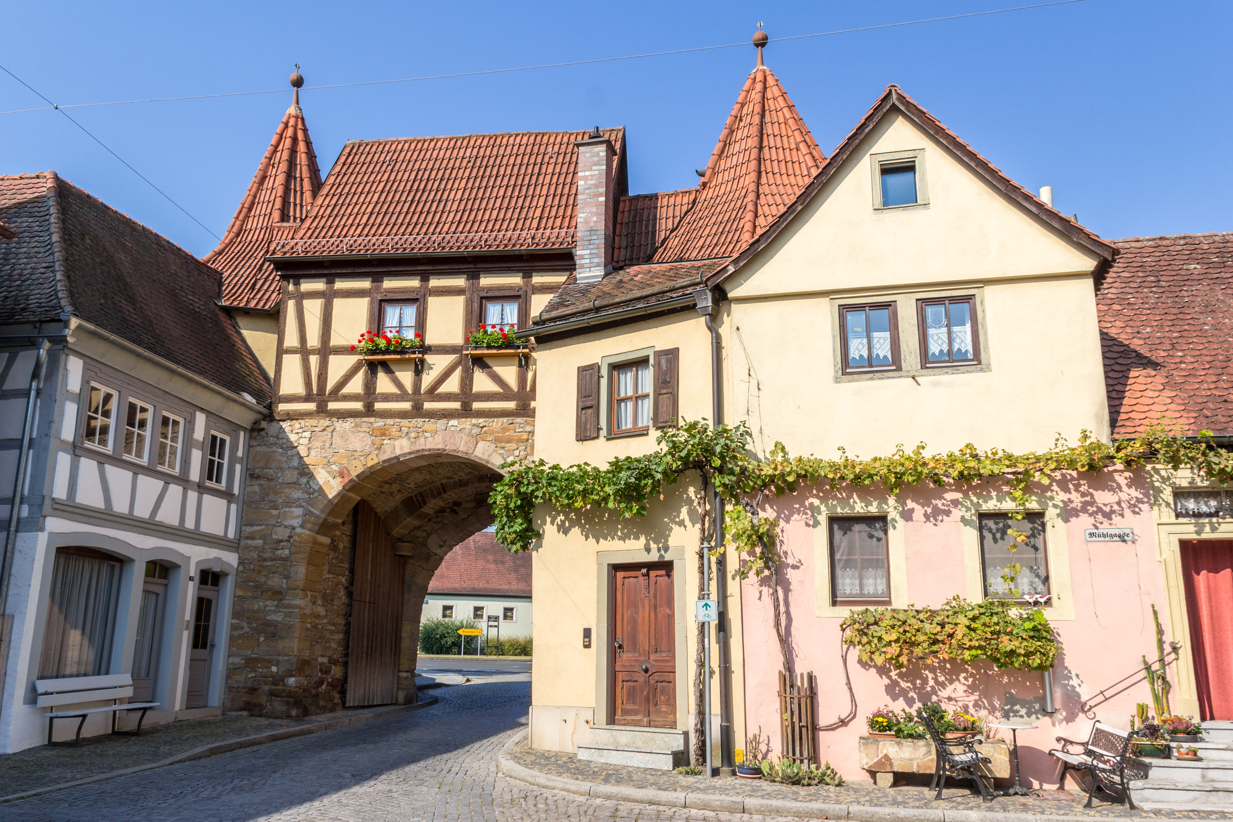 Prichsenstadt, Kleinhaus, Mühlgasse 1This is a photograph of an architectural monument.